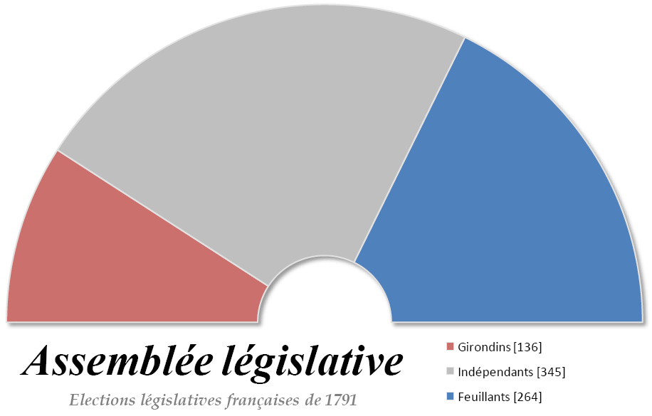 Composition de l'Assemblée législative française élue en septembre 1791